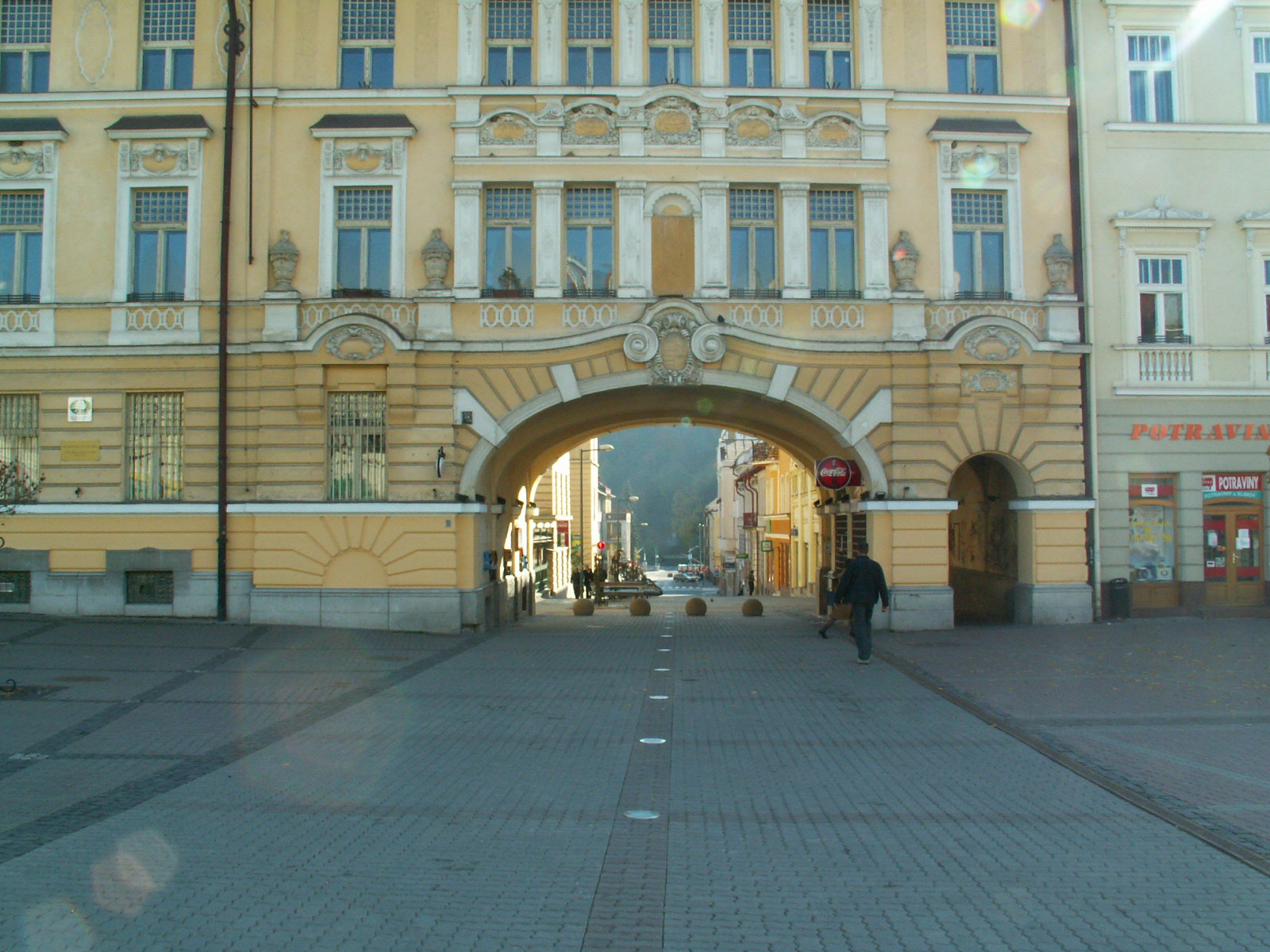 Námestie SNP - vchod do NárodnejUlice